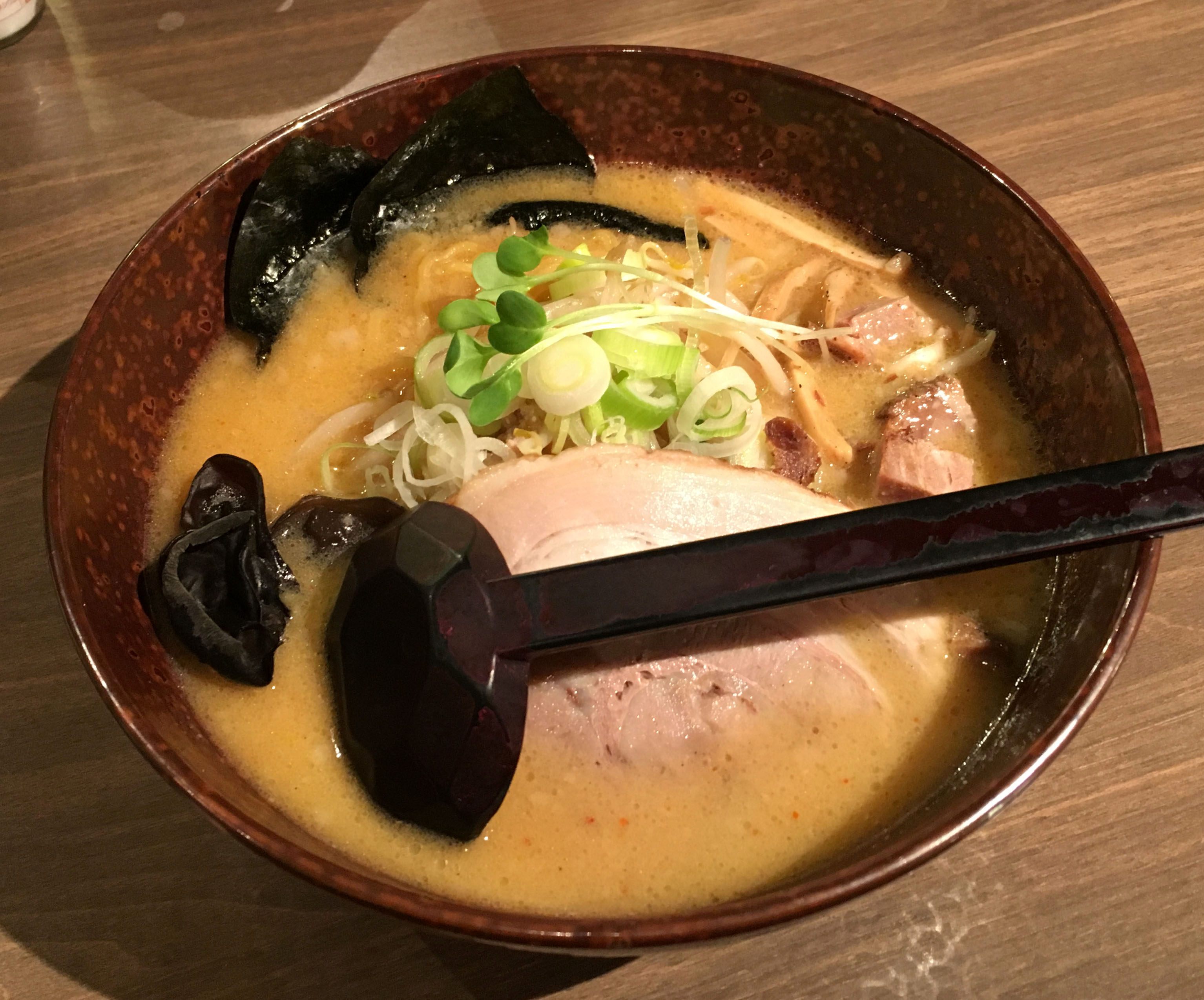 白樺山荘の味噌ラーメン